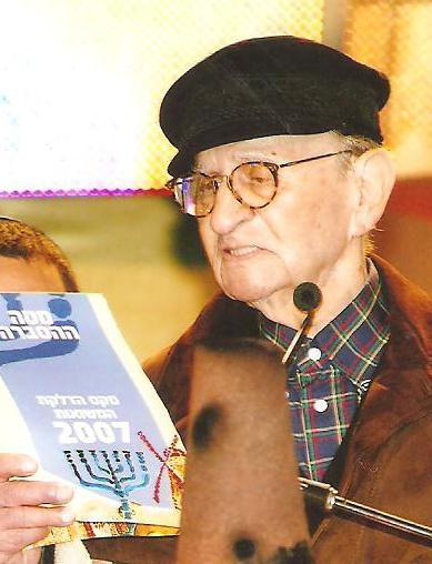 אליהו סחרוב